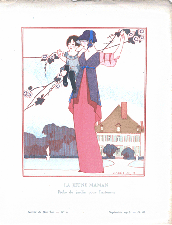 Dessin de mode publié dans La Gazette du Bon Ton sousle titre "La jeune maman"